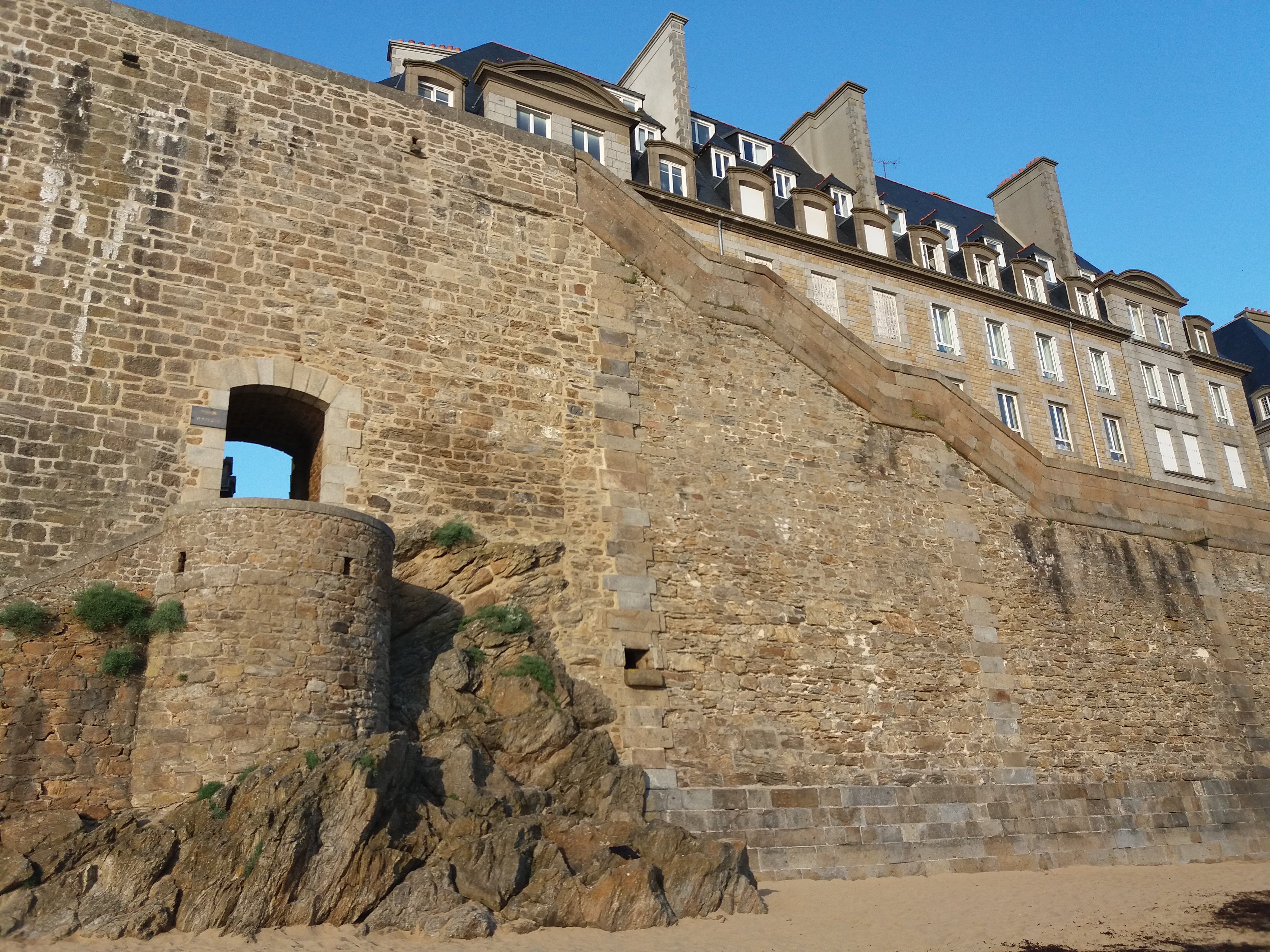 Saint-Malo (Ille-et-Vilaine, France)